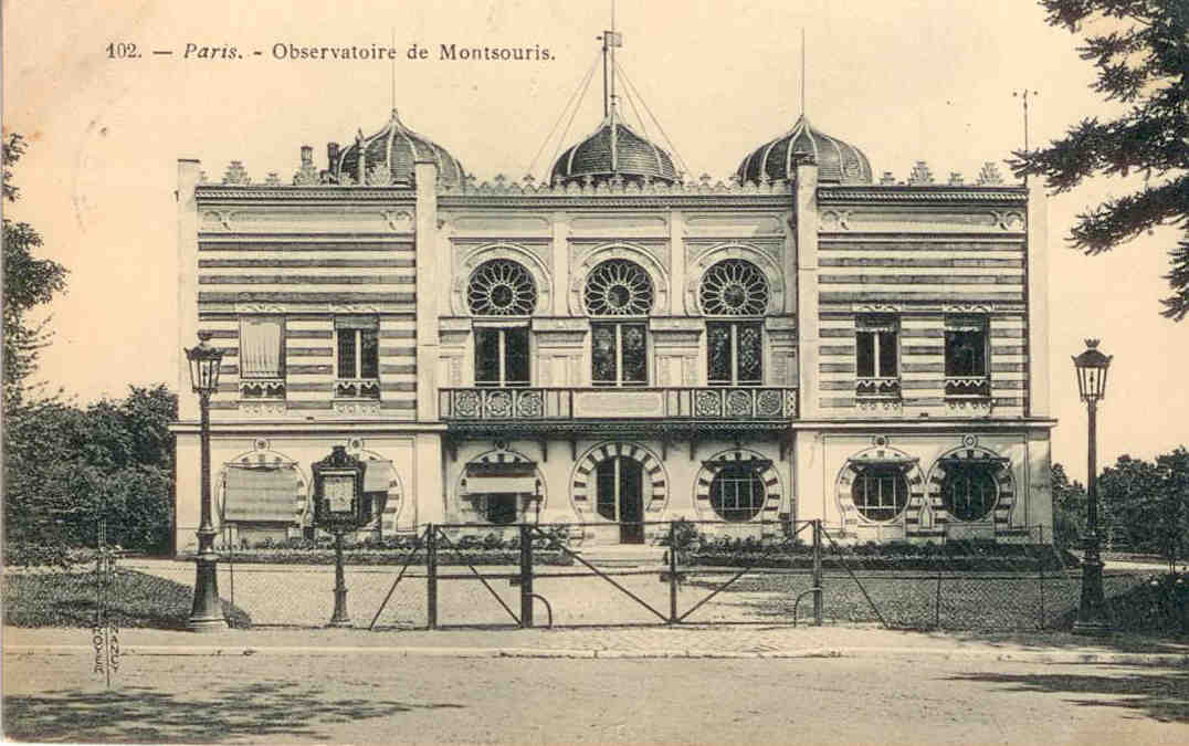 Vue du palais du Bardo au Parc Montsouris (incendié et anéanti en 1991).